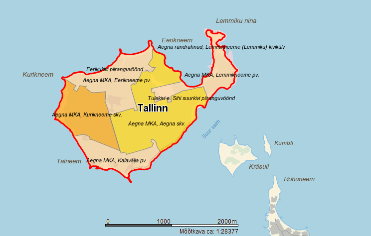 Aegna MKA kaart. Põhineb Maa-ameti kaardil.